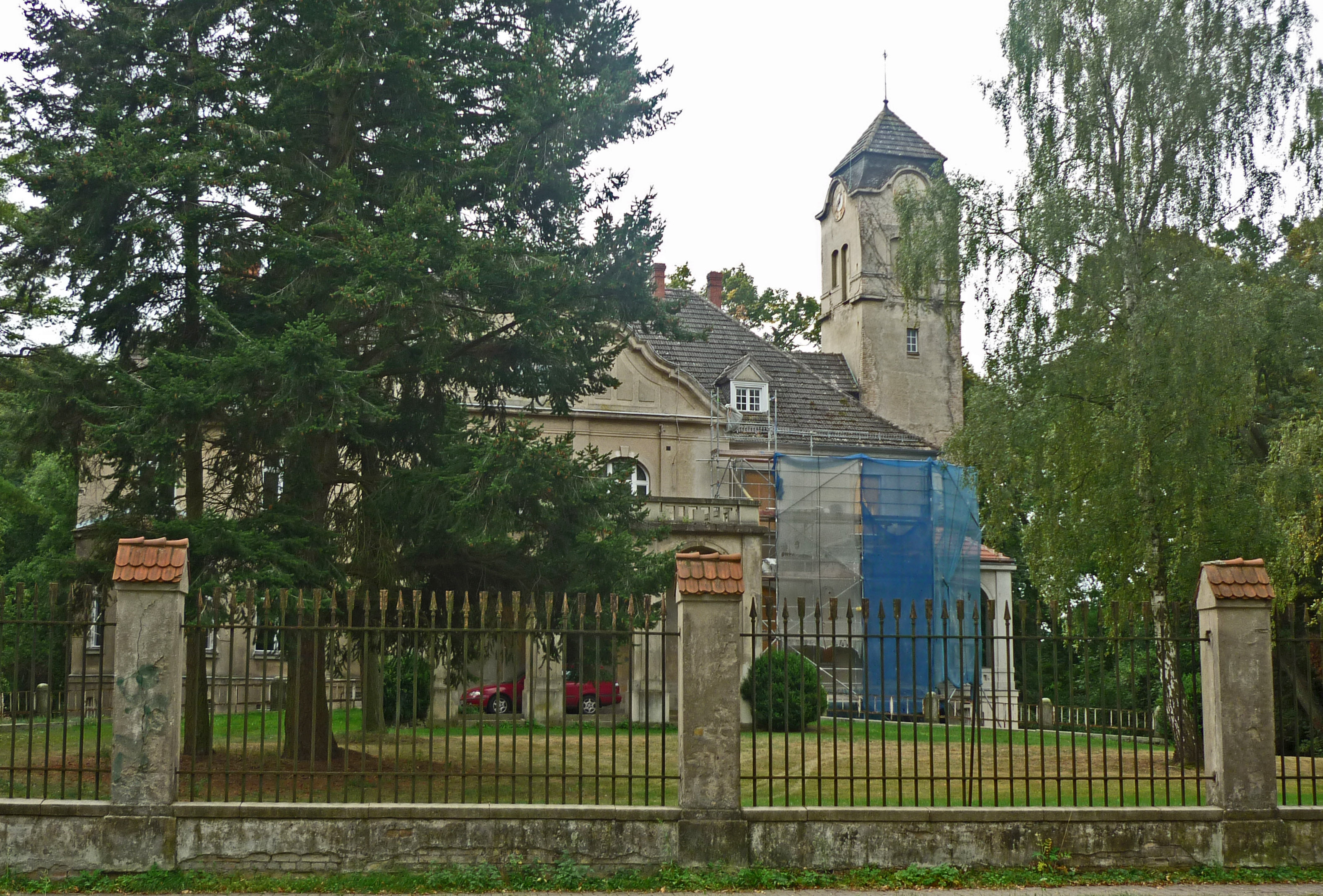 Schloss Wansdorf (Jugendstil-Villa), erbaut 1906 durch den Industriellen Ferdinand Griebenow